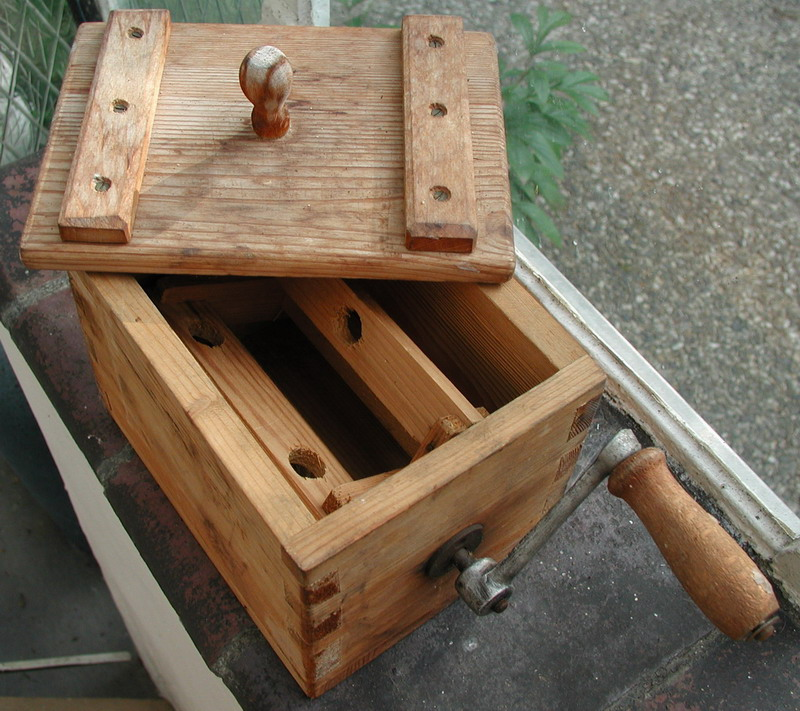 Butterzubereiter aus Holz